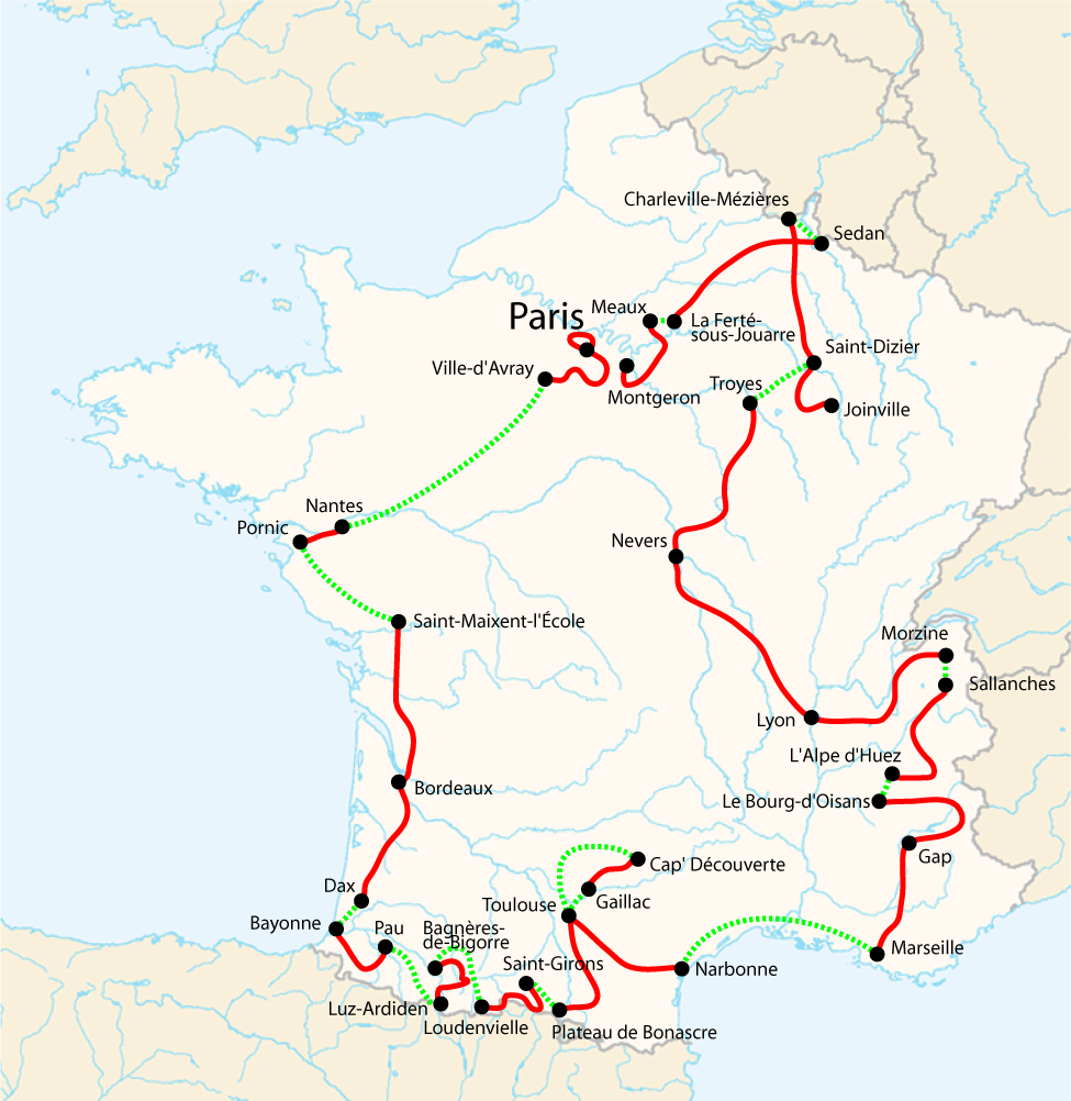 Tour de France 2003